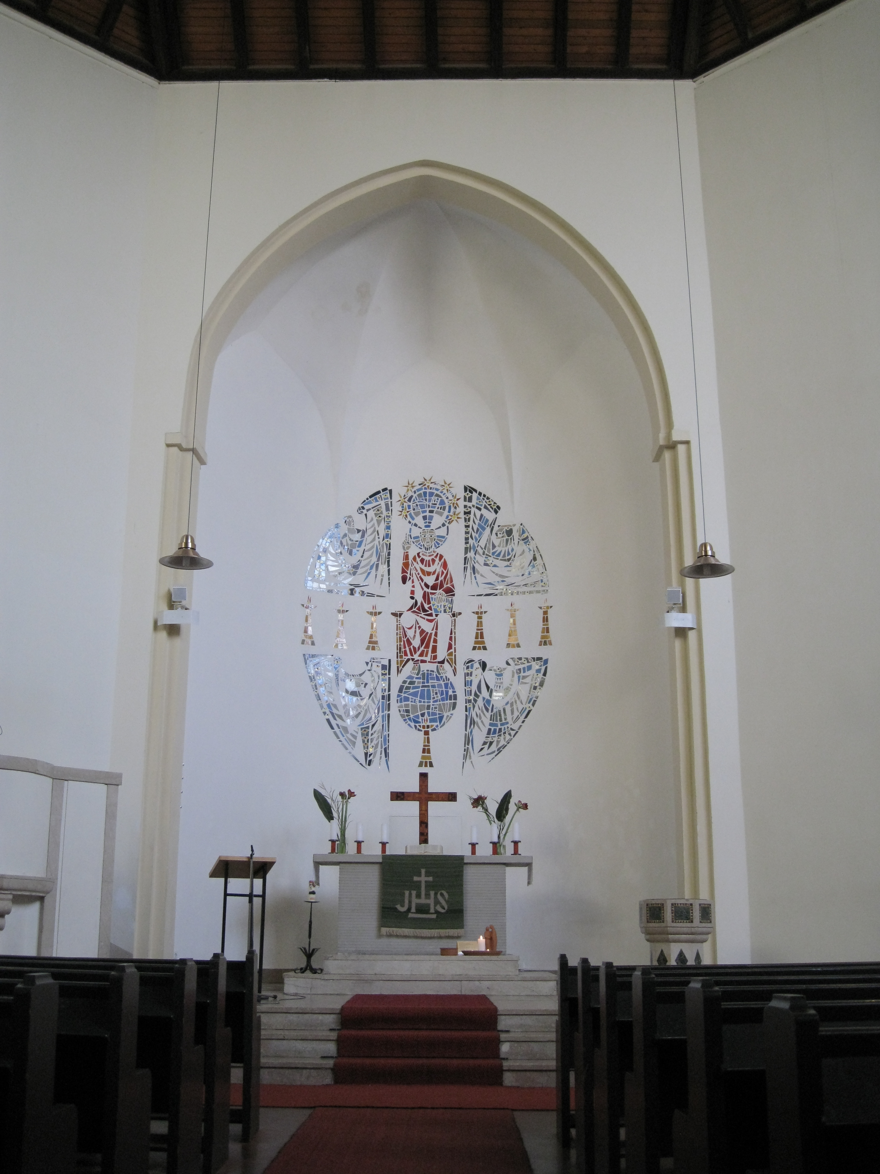 Blick auf den Altar und das Mosaik der Adventkirche